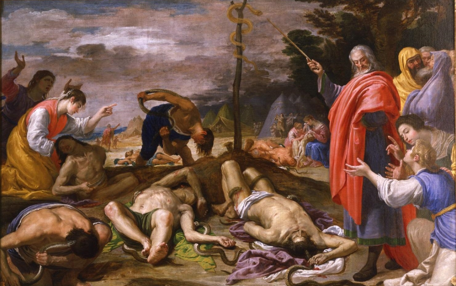 En una de las recurrentes protestas de los israelitas contra Dios y Moisés, se les castiga con el envío de serpientes venenosas que causan la muerte de muchos por su mordedura. Arrepentidos, suplican a Moisés que les ayude. Dios ordena a Moisés que haga una escultura de metal (cobre o bronce según la versión) y que los mordidos fijen su vista en ella. Los que lo hacen se curan de la picadura. Moisés, con una túnica roja, indica con su vara la acción salvadora ofrecida a los heridos.